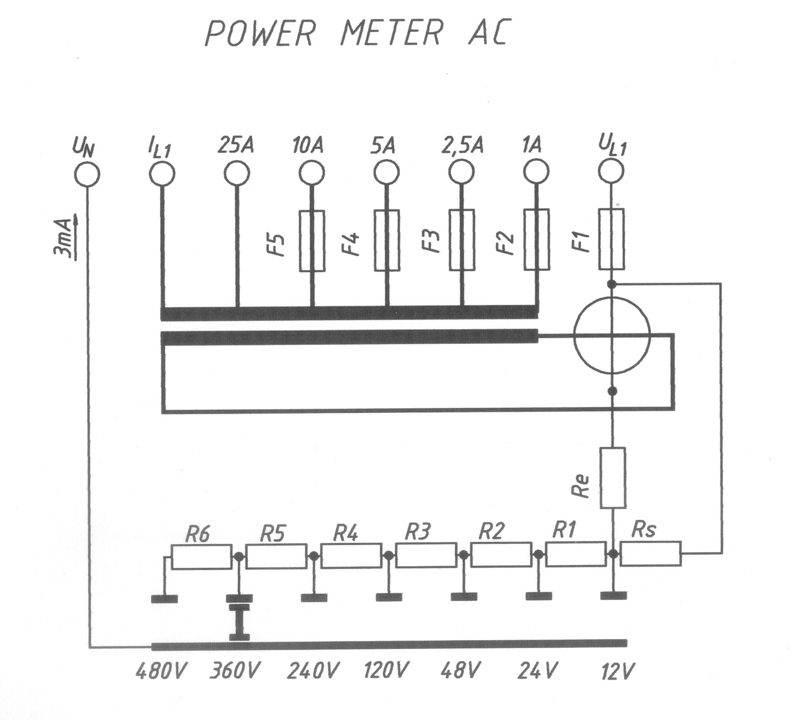 Egyfázisú hatásos teljesítmény mérése elektrodinamikus-, vagy ferrodinamikus teljesítménymérővel áramváltó használatával